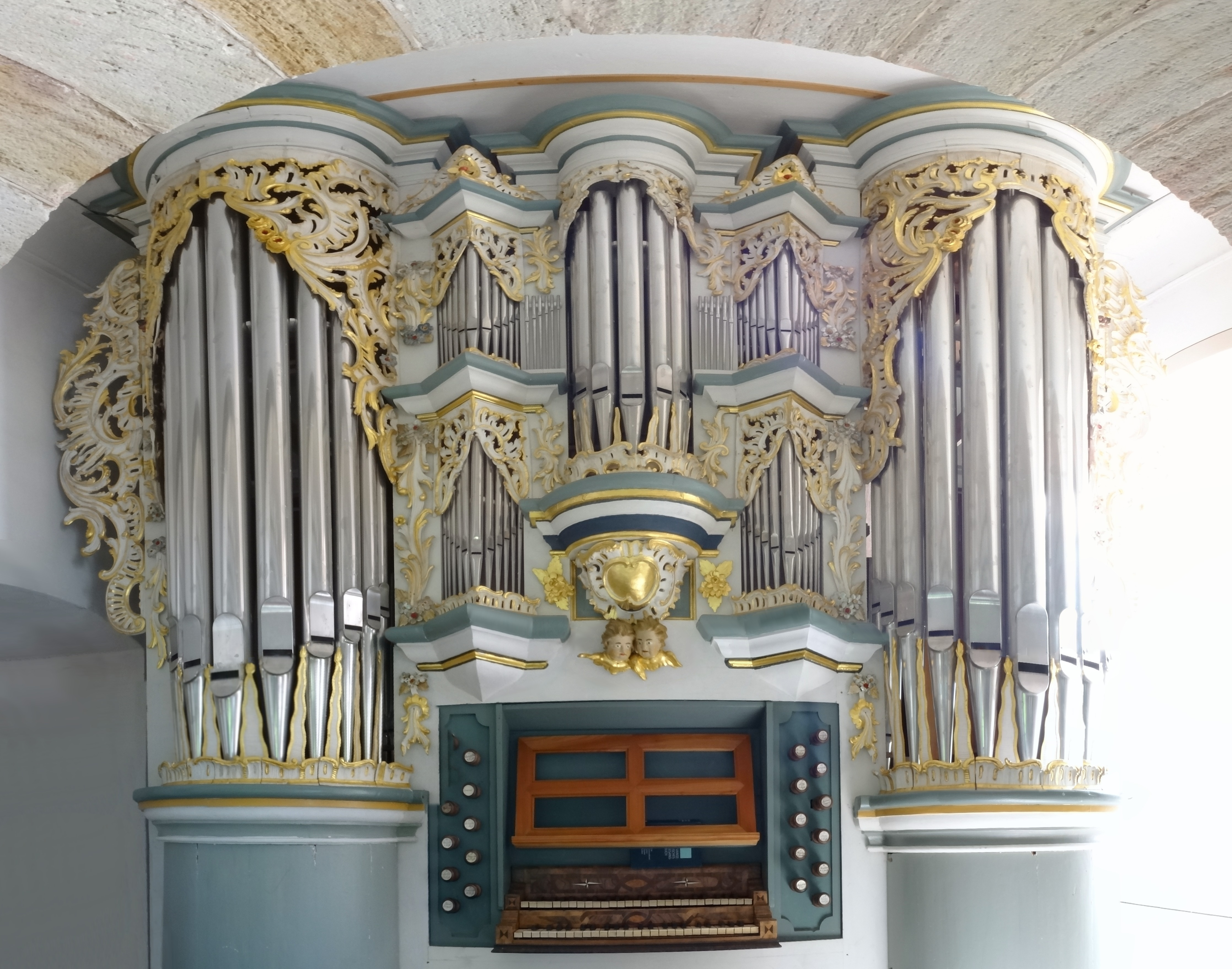 Orgel von Johann Caspar Rommel, 1766, Dorfkirche Wohlmuthausen